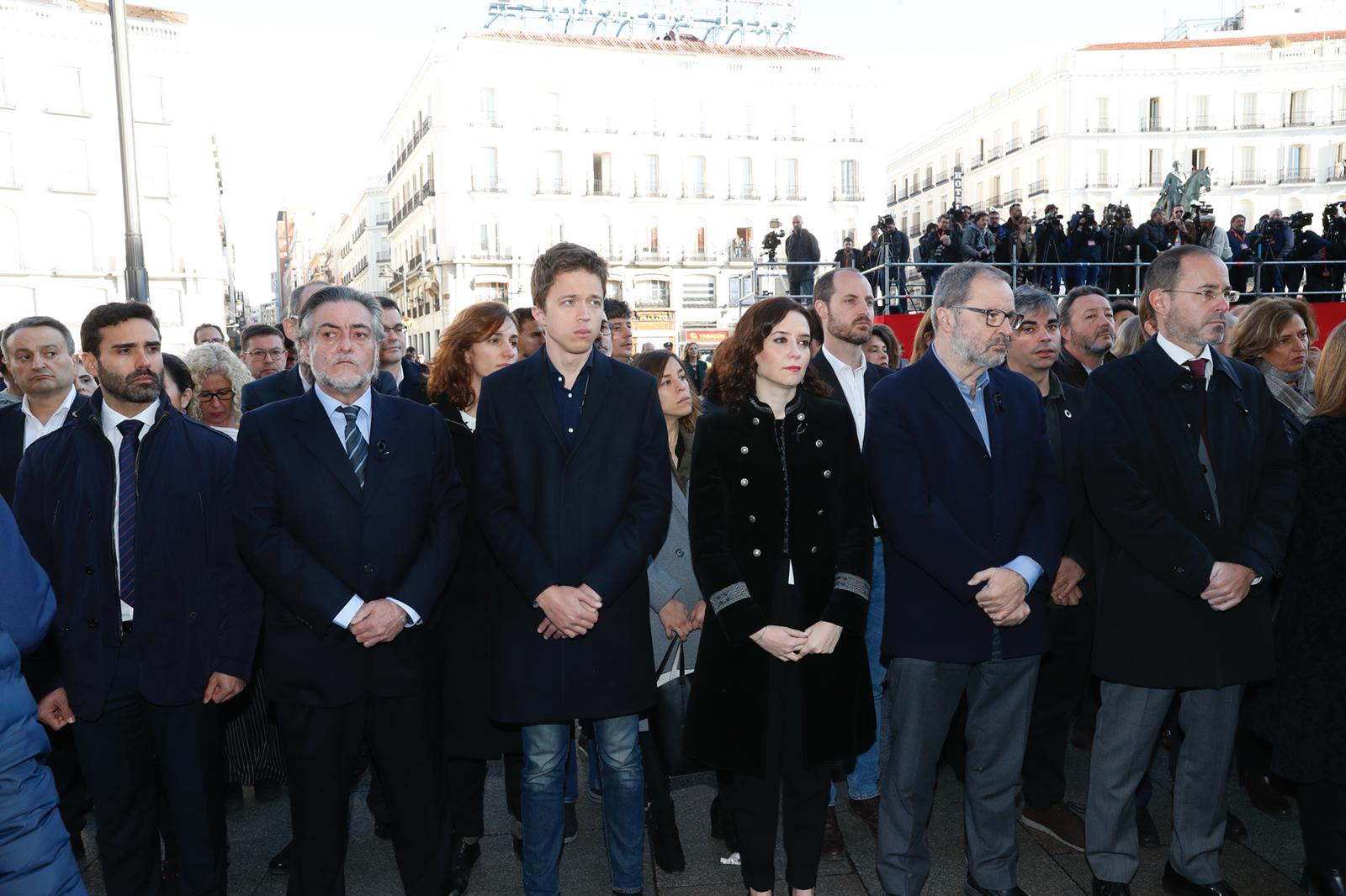 Actos en recuerdo de las victimas del 11M en el 15 aniversario de los atentados.